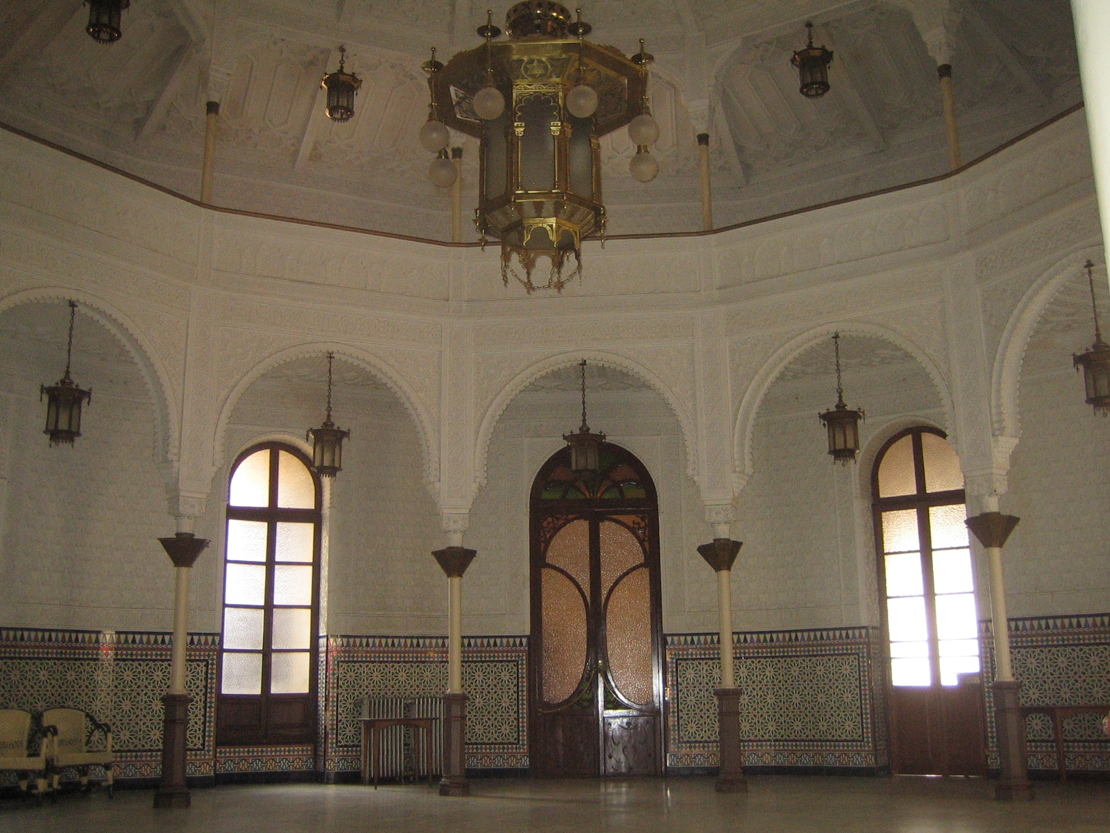 Salón Árabe. Círculo Alzireño. Alzira (España)